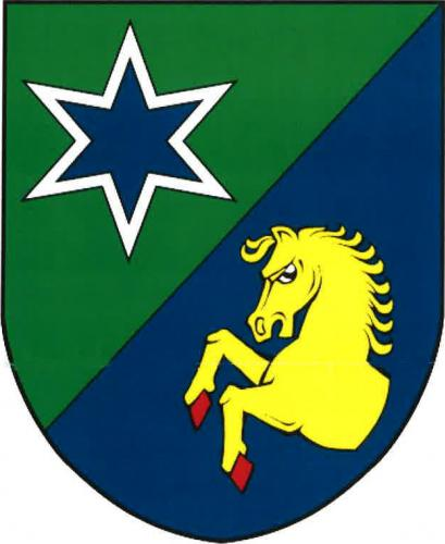 Pěčnov znak